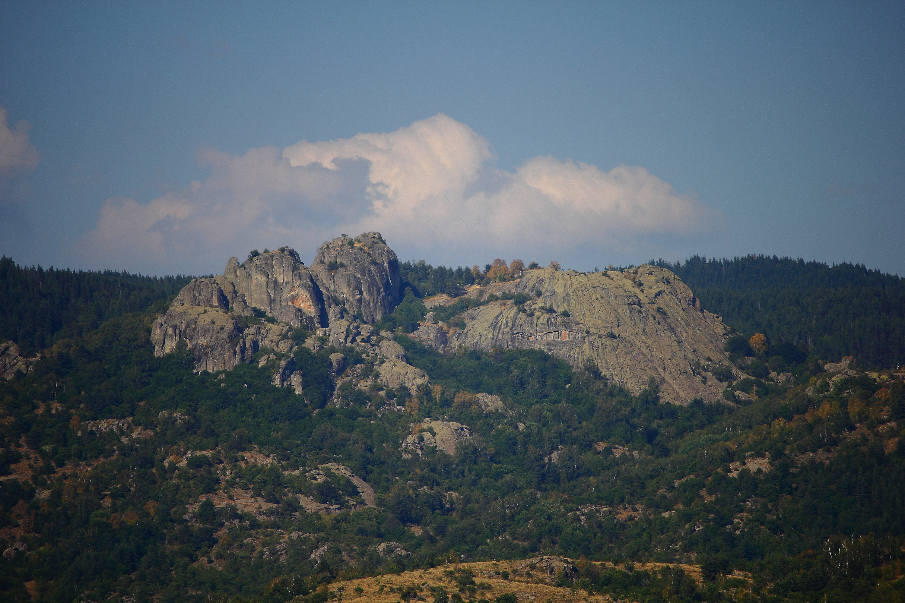 Поглед от Туховища към Почански Скали, по-добре познати като "Момини Скали" от местните жители.